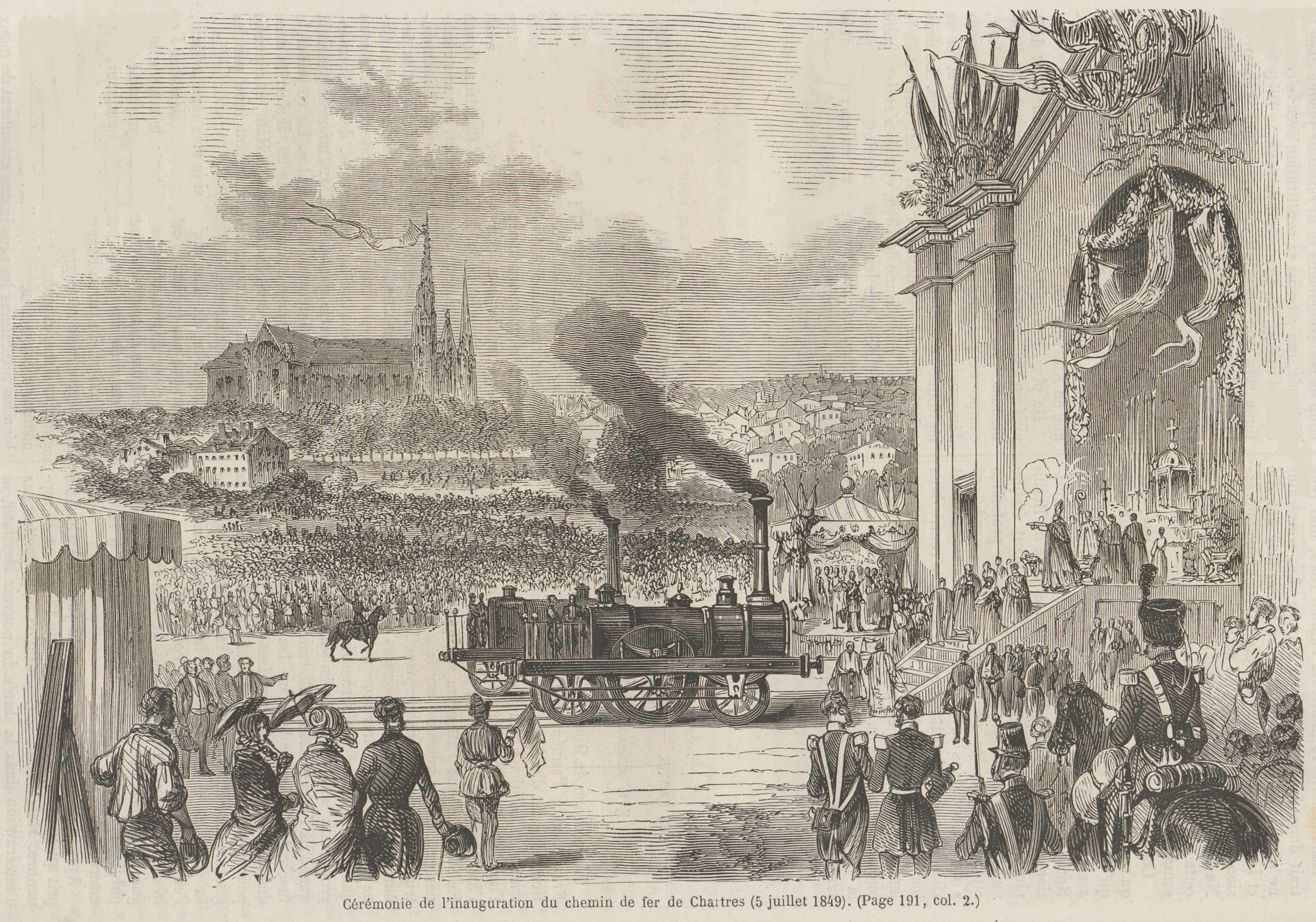 Cérémonie de l'inauguration du chemin de fer de Chartres (5 juillet 1849). . Gravure extraite de l'ouvrage de Victor Duruy, Histoire populaire contemporaine de la France, Tome deuxième, Paris, Lahure, 1865, p. 192.